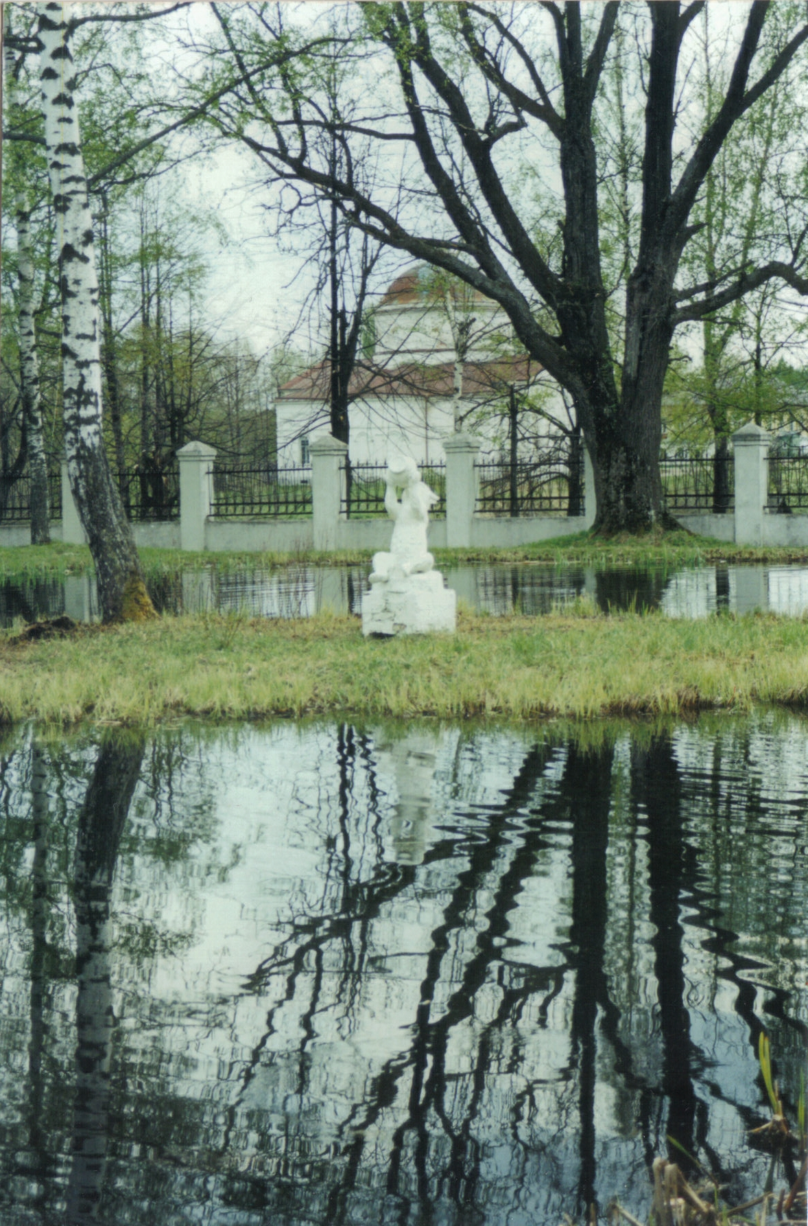 Park in Myshkin, spring 2004